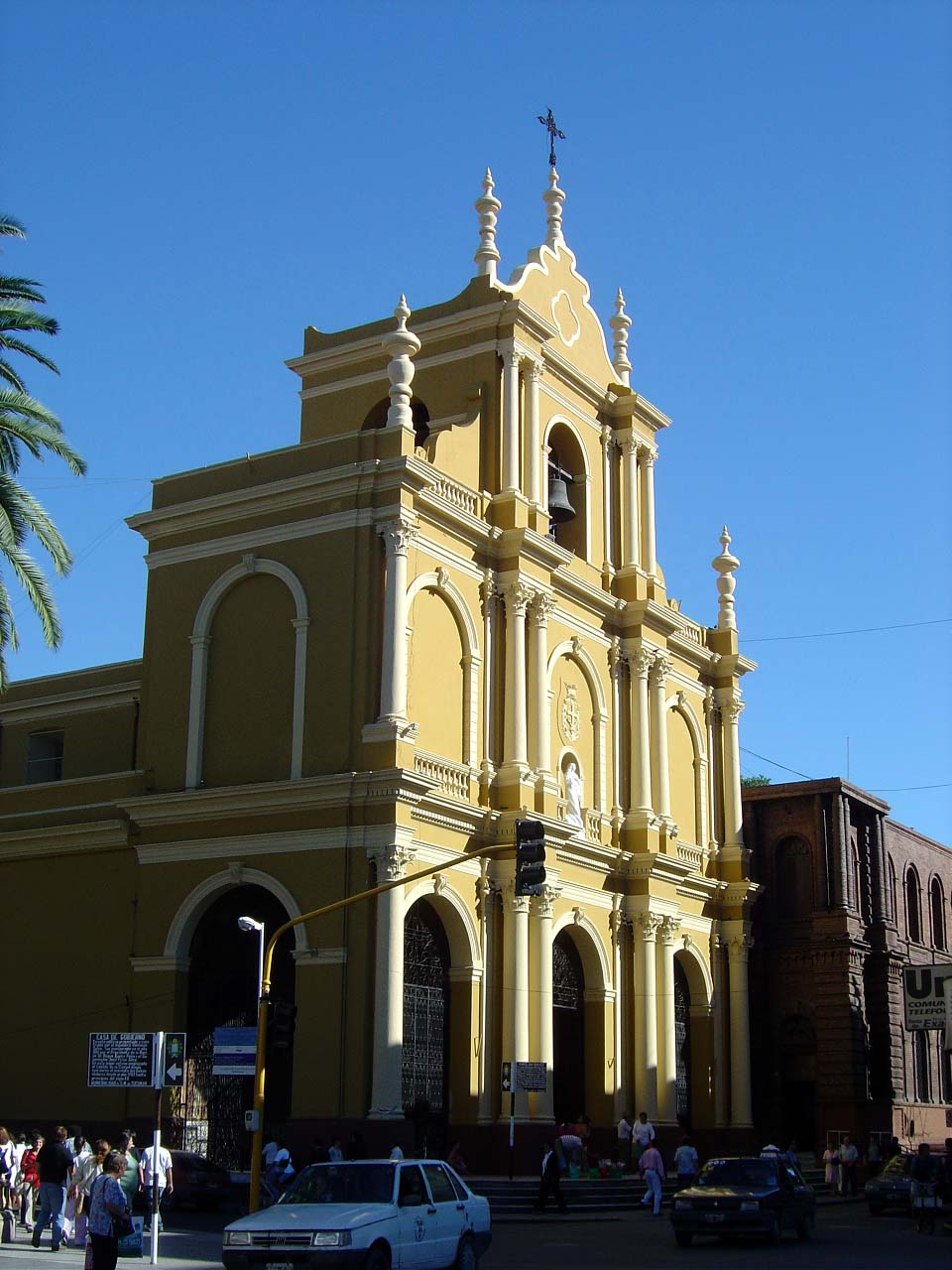 San Francisco Basilica, Tucumán, Argentina.